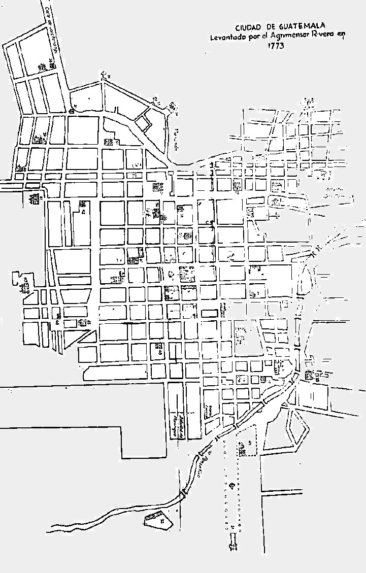 Mapa de localización de Antigua Guatemala